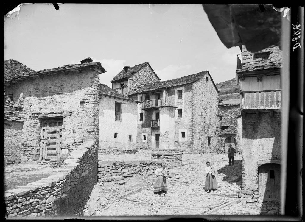 Imatge